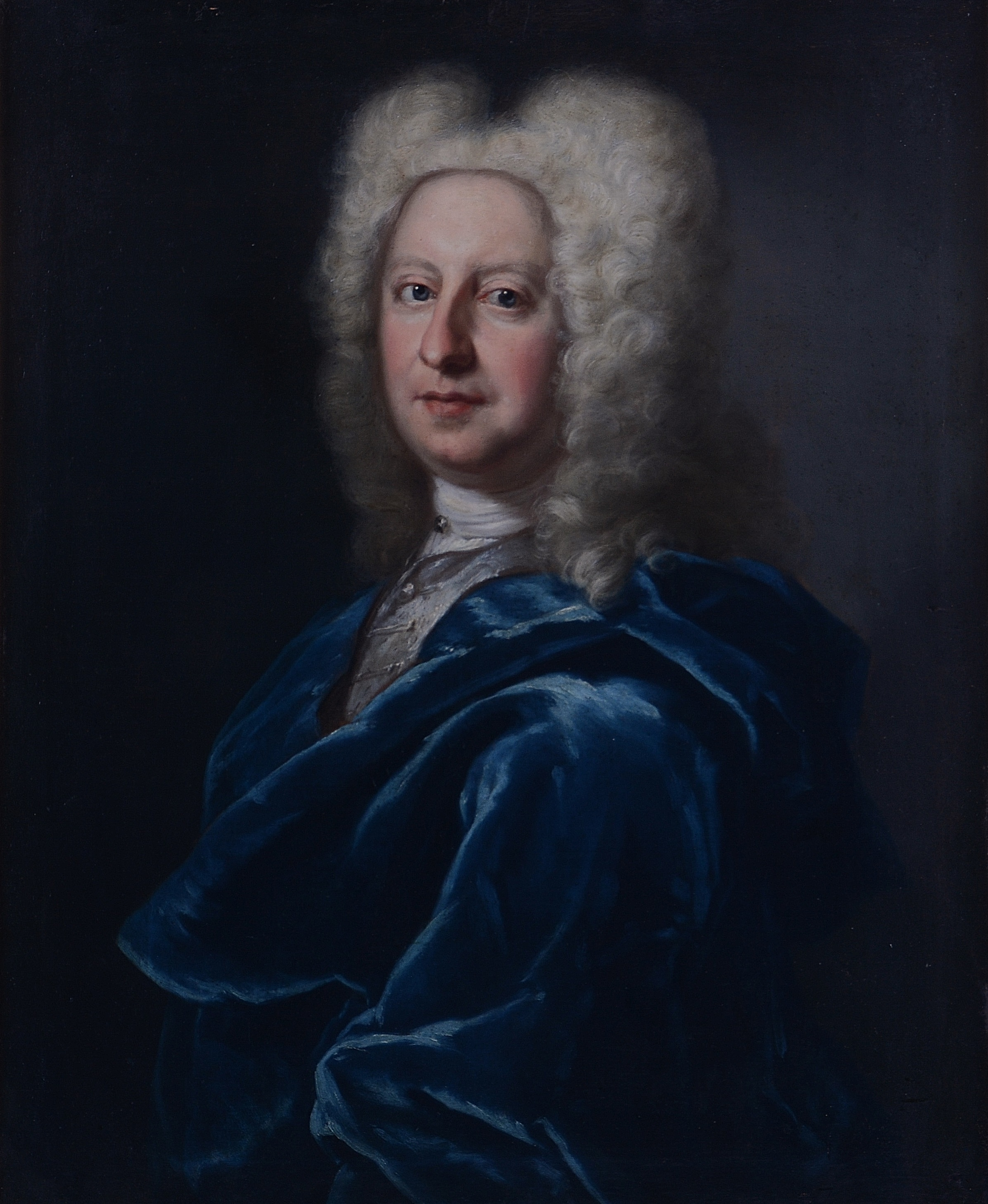 Porträtt av Grosshandlaren herr Clas Wittmack (1686-1726), avporträtterad ca 1720 av Johan Henrik Scheffel. Wittmark bär peruk samt en grå dräkt, över vilken en blå mantel är draperad.